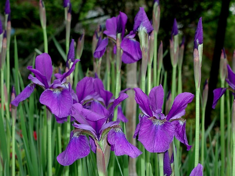 アヤメ 撮影場所：広見町 撮影日：２００２年４月２１日